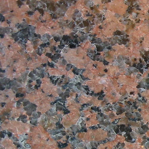 Siim Sepp, 2005 rapakivi granite (type: Pyterlite).